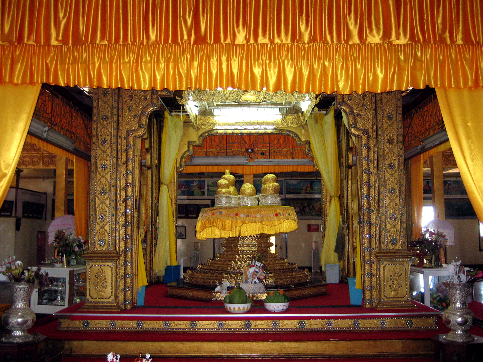 Buddha statues of Hpaung Daw U Pagoda, Inlay Lake, Shan State, Myanmar (Burma)